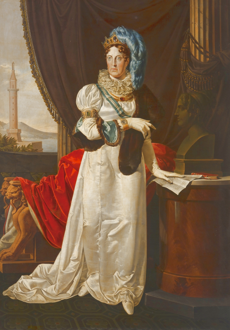 Ritratto di Maria Carolina d'Asburgo-Lorena (1752-1814)